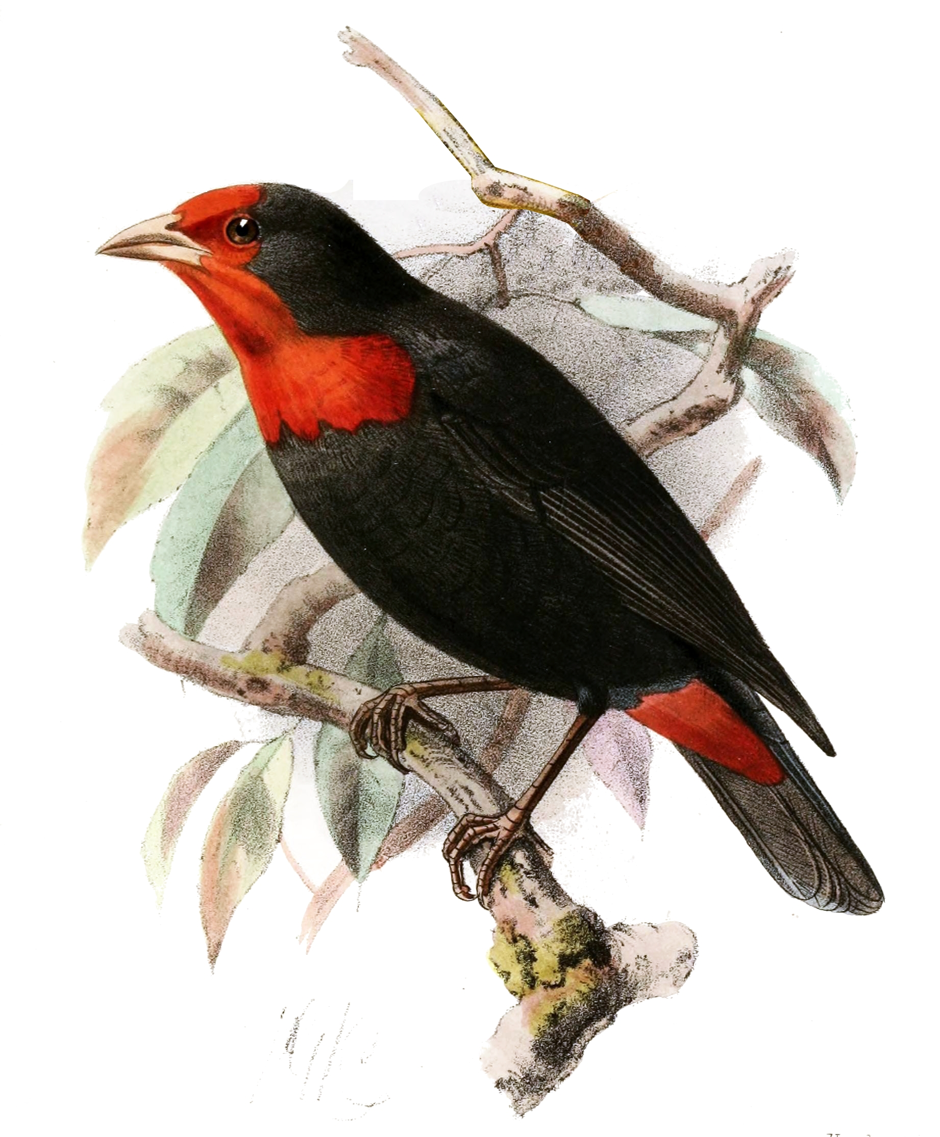 Malimbus rubropersonatus = Malimbus scutatus rubropersonatus